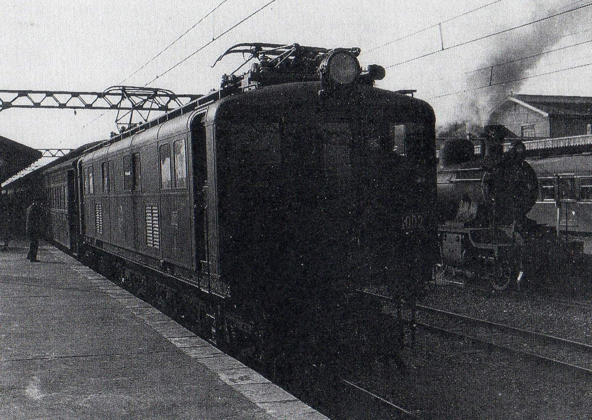 東和歌山駅（現・和歌山駅）の阪和の電関。右は8620形蒸機